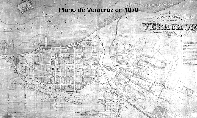 English Old photos of Veracruz City. State of Veracruz. Mexico. Spanish Fotos viejas de la Ciudad de Veracruz. Estado de Veracruz. México. Plano de la Ciudad de Veracruz. Año 1878.